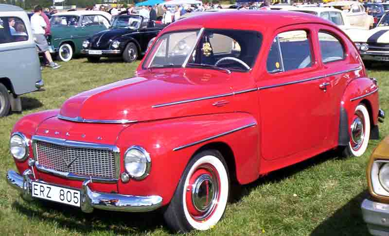 Volvo PV444 2-Door Sedan 1957